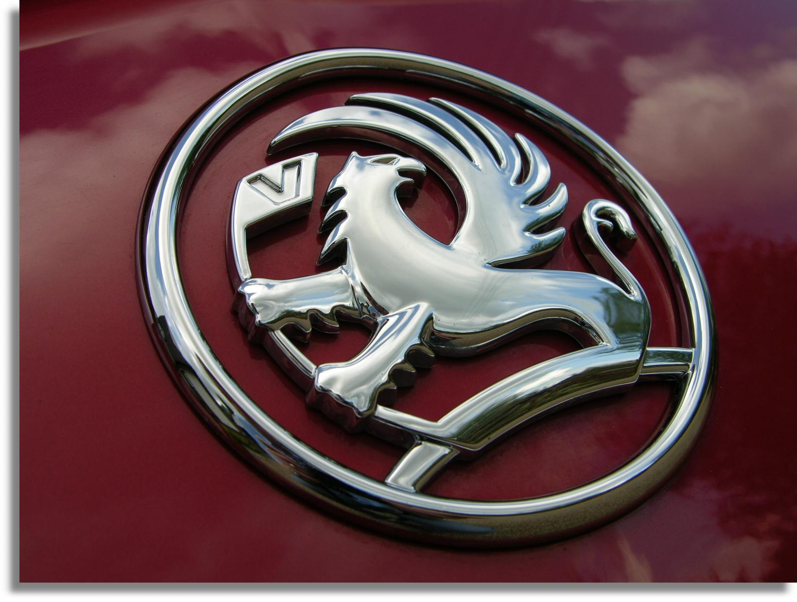 Vauxhall VX220